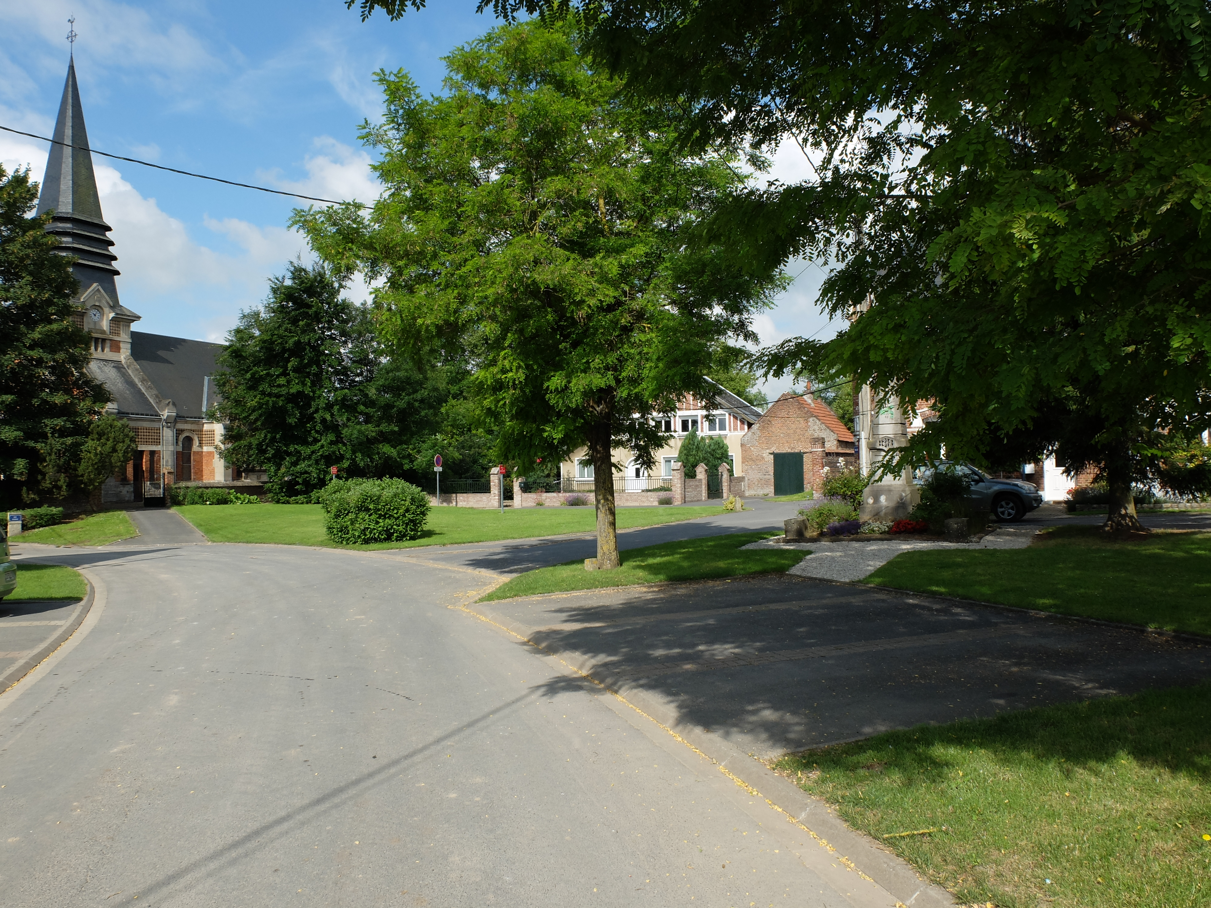 Vue de la place Michel de Warenghien d'Éterpigny (Pas-de-Calais).